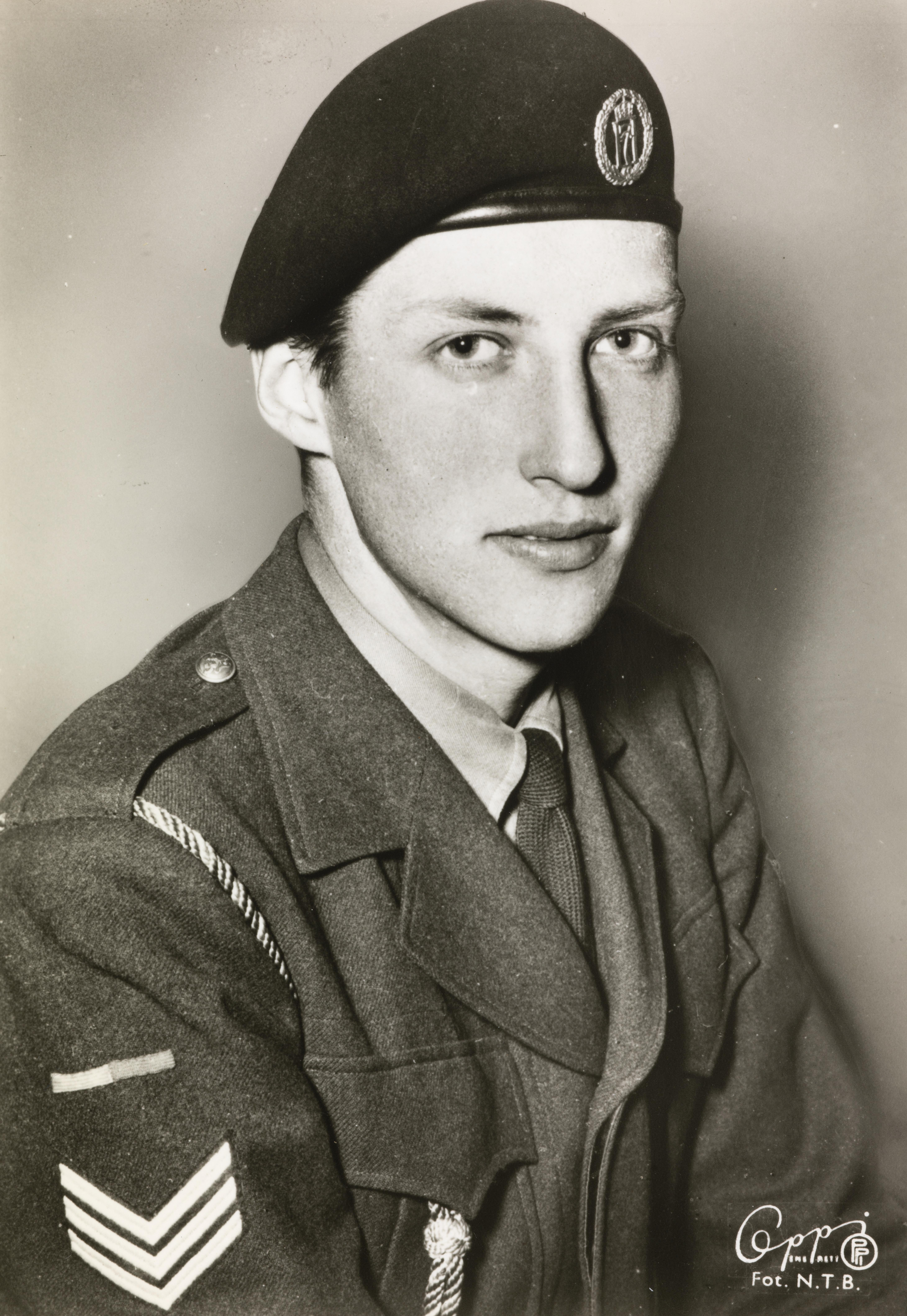 Bildet er hentet fra Nasjonalbibliotekets bildesamling. Anmerkninger til bildet var: Portrettet er tatt mot slutten av prins Haralds tid som elev ved Kavaleriets befalsskole på Trandum (1955-57) Depicted person: Harald V konge av Norge